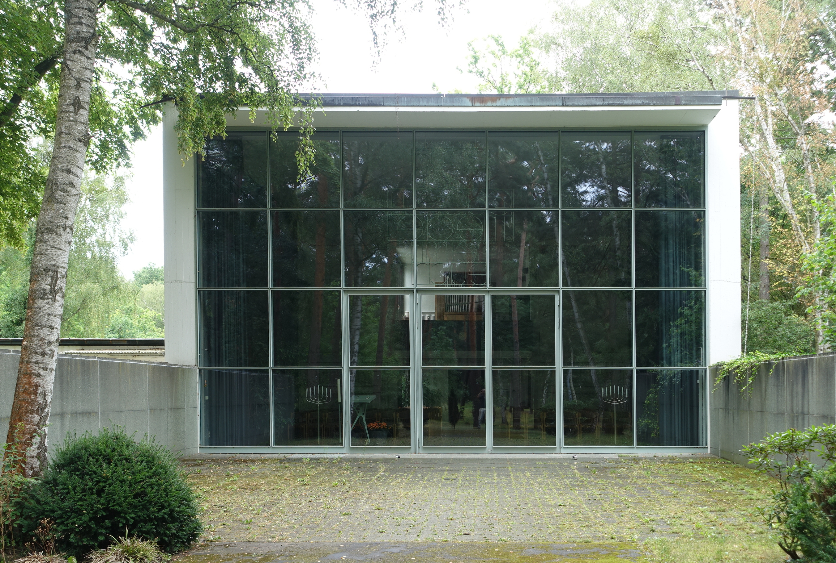 Feierhalle